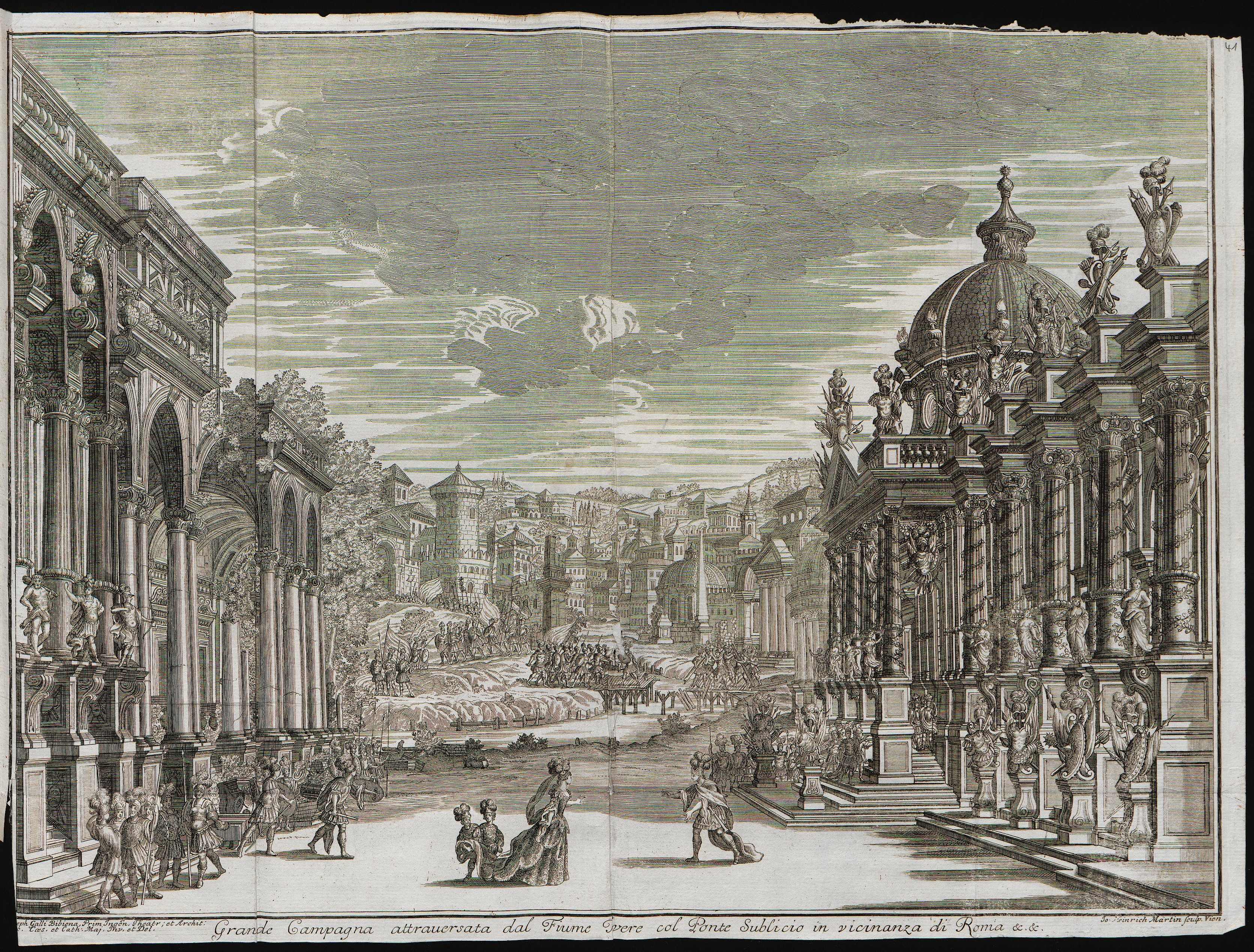 Grafik aus dem Klebeband Nr. 15 der Fürstlich Waldeckschen Hofbibliothek Arolsen Costanza e fortezza, Oper von Johann Joseph Fux (Musik), Pietro Pariato (Libretto), uraufgeführt 28. August 1723 in Prag zur Krönung Karl VI. zum König von Böhmen. Theaterarchitektur und Bühnenbilder von Giuseppe Galli da Bibiena. Motiv: "Grande Campagna attrauersata dal Fiume Tevere col Ponte Sublicio in vicinanza di Roma etc. etc." Bühnenbild: Vom Fluß Tiber durchflossene Landschaft beim Pons Sublicius in der Nähe von Rom. Orazio verteidigt die Brücke, gegen ihn stürmen Etrusker an. Hinter ihm brechen seine Leute die Brücke ab. Im Vordergrund Mucius Scaevola und Clelia.